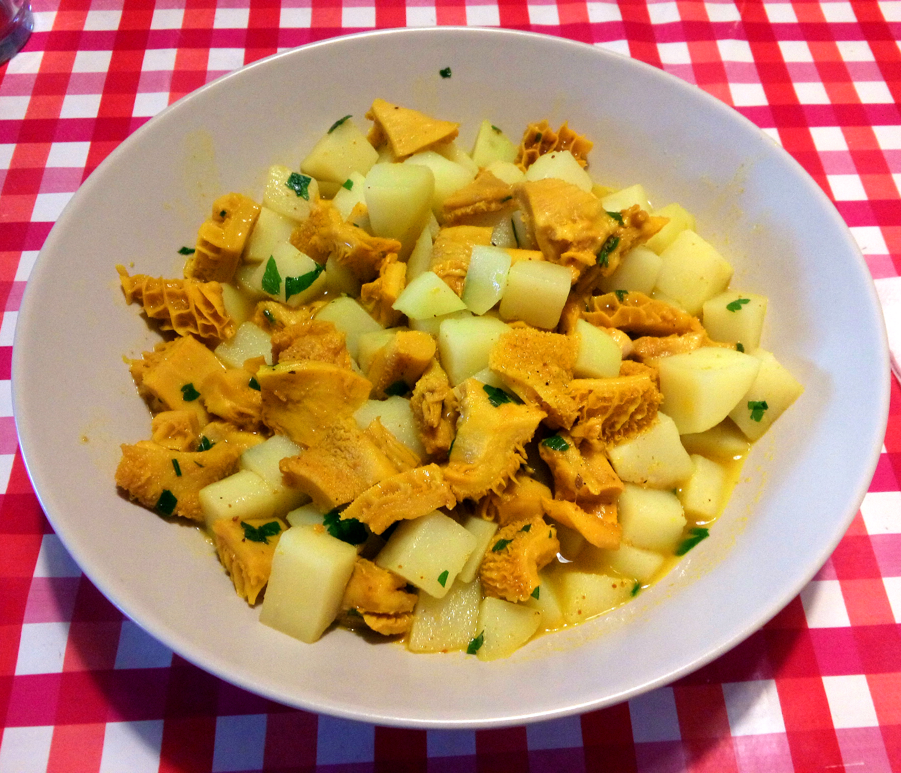 Plato de caucau sin arroz.